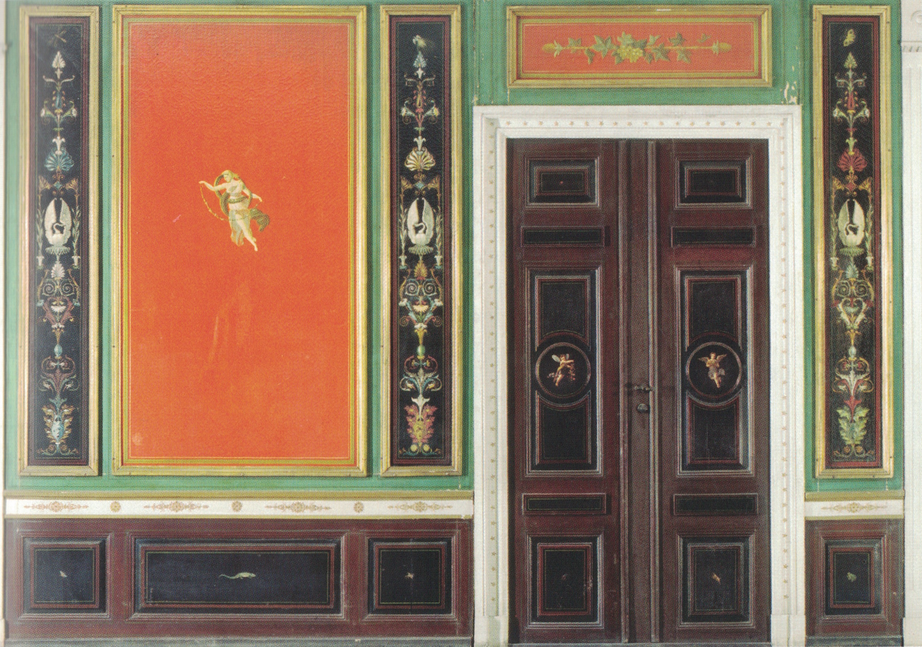 Fotografi